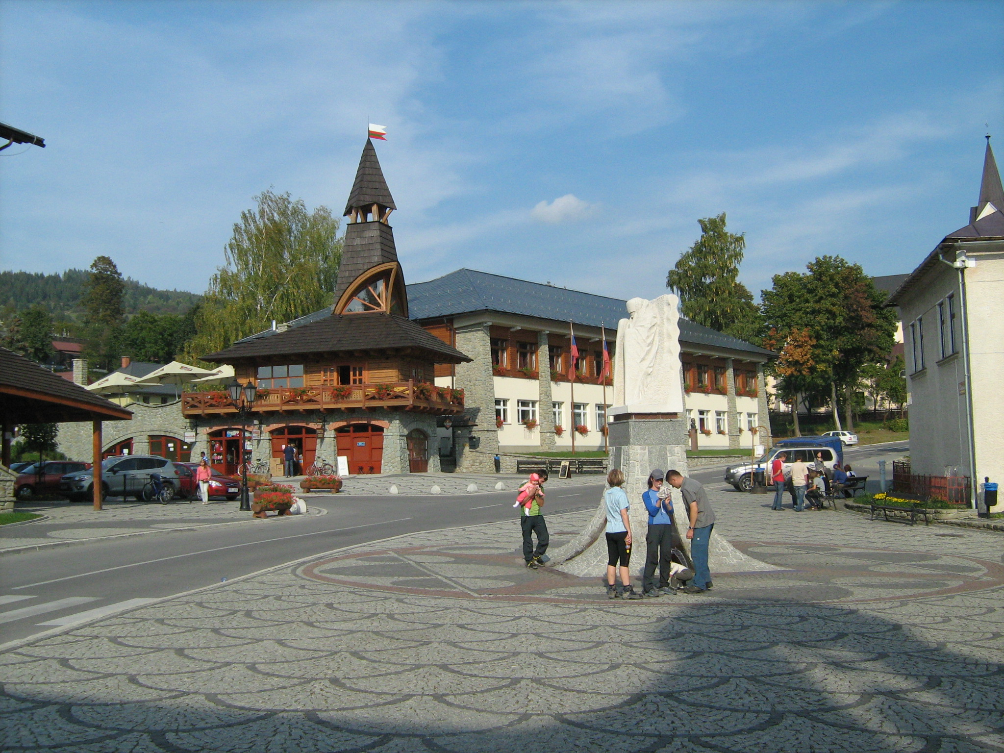 Stará Bystrica